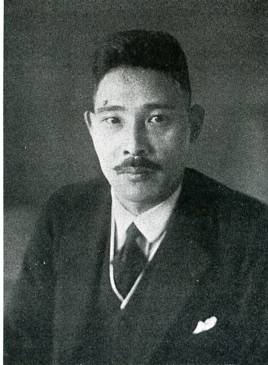 この写真は、1932年頃における土倉宗明（1889-1972）の写真です。